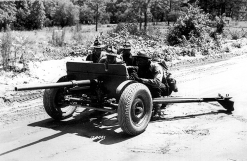 Amerikanische 37 mm Kanone (de:1941)